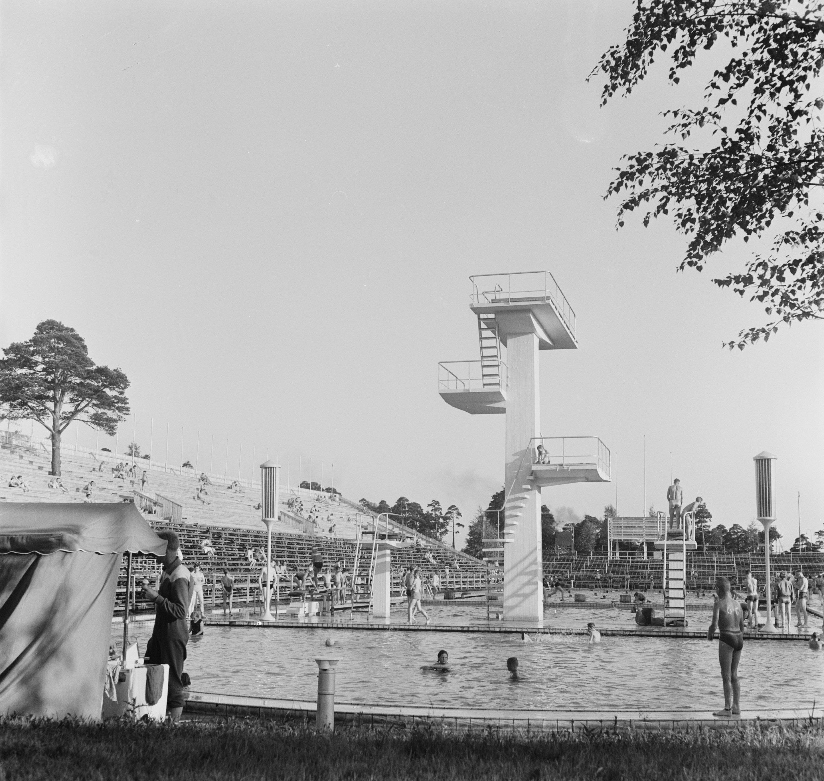 Collectie / Archief : Fotocollectie Anefo Reportage / Serie : Olympische Zomerspelen Helsinki (1952) Beschrijving : Olympisch zwemstadion Datum : 18 juli 1952 Locatie : Finland, Helsinki Trefwoorden : stadions, zwembaden Fotograaf : Pot, Harry / Anefo Auteursrechthebbende : Nationaal Archief Materiaalsoort : Negatief (zwart/wit) Nummer archiefinventaris : bekijk toegang 2.24.01.03 Bestanddeelnummer : 905-2195